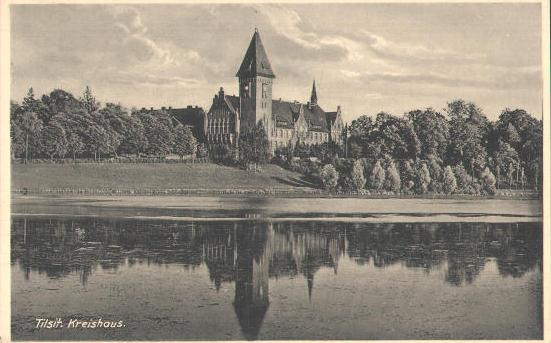 Tilsit Krankenhaus